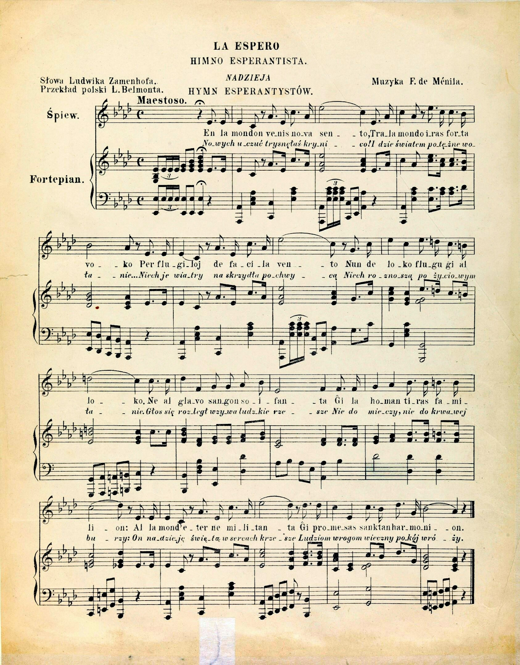 La Espero : Himno esperantista. Partituro, pola kaj esperanta tekstoj de la himno. Varsovio, eldonejo de M. Borkowski